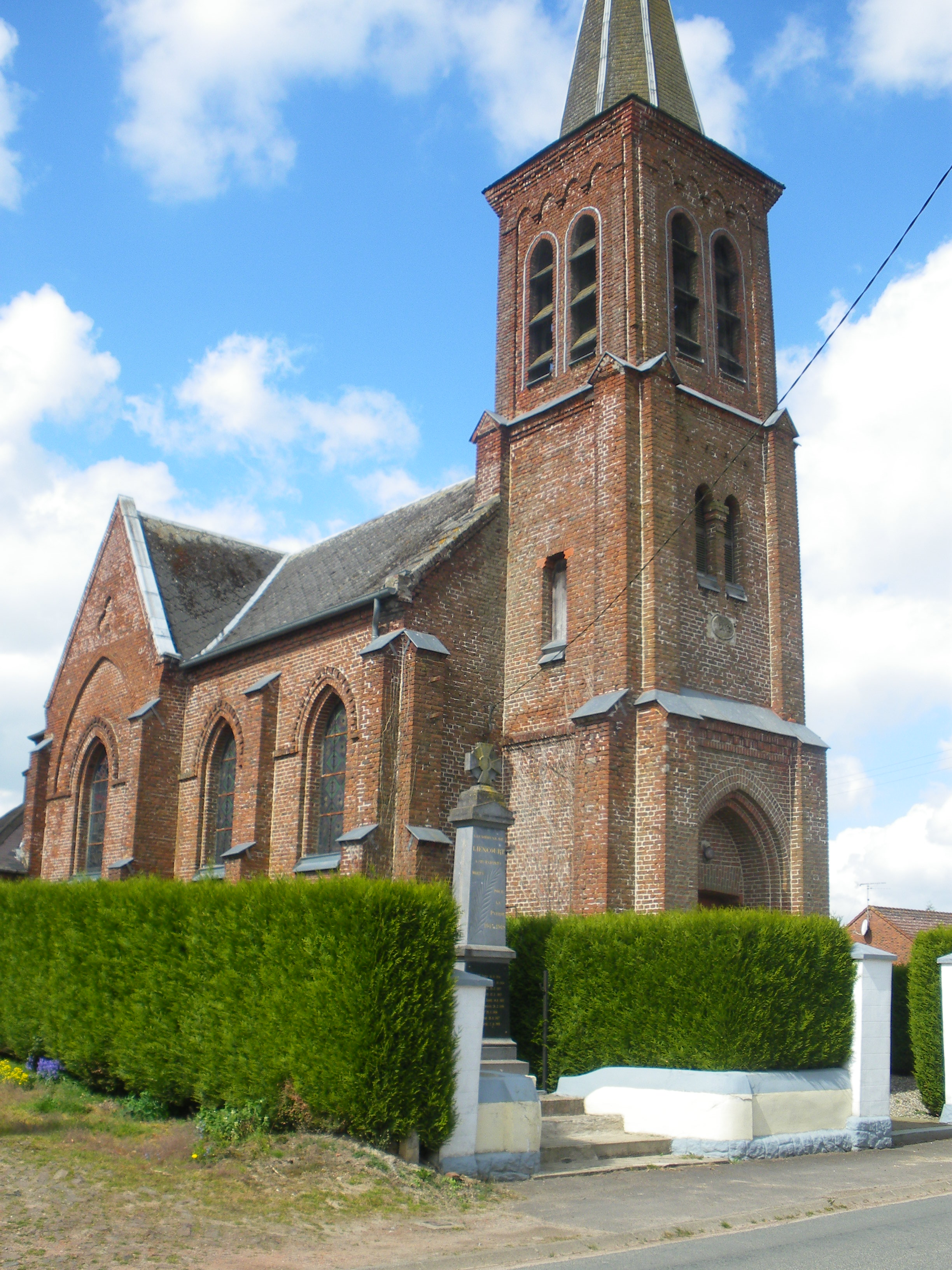 Vue de l'église Saint-Joseph et du monument aux morts de Liencourt.